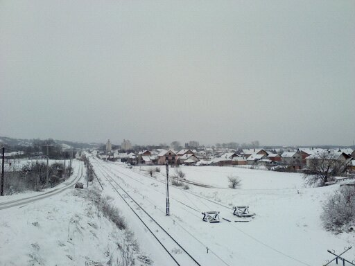 Srpski (latinica): Batočina pod snegom u decembru 2012.